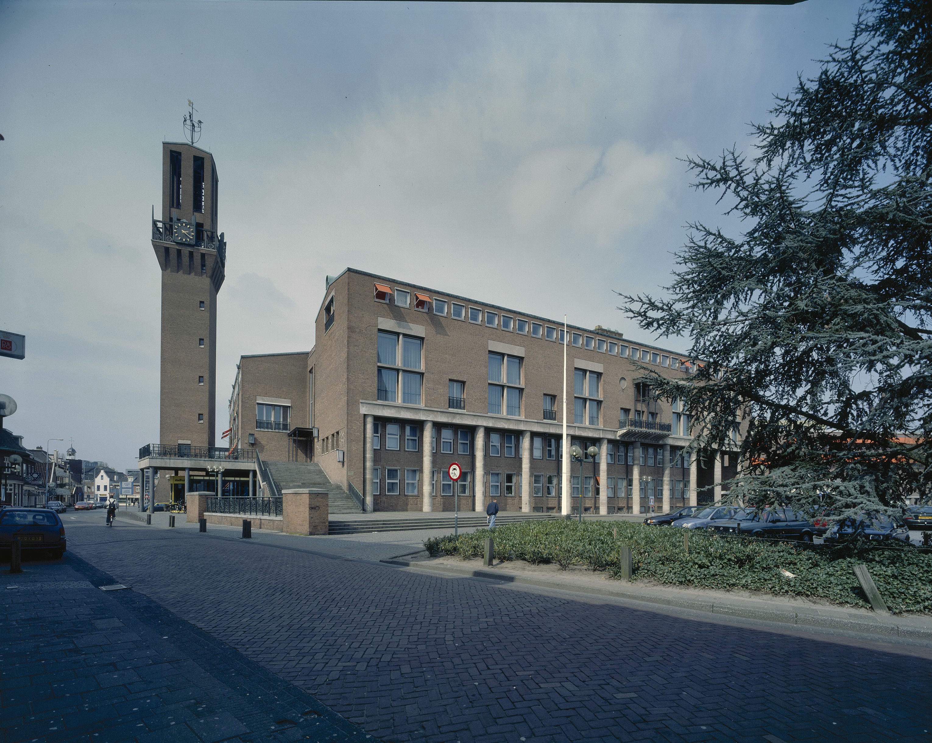 Stadhuis: Overzicht voorgevel met vrijstaande toren en rechter zijgevel met galerij (opmerking: Gefotografeerd voor Toonbeelden van de Wederopbouw)